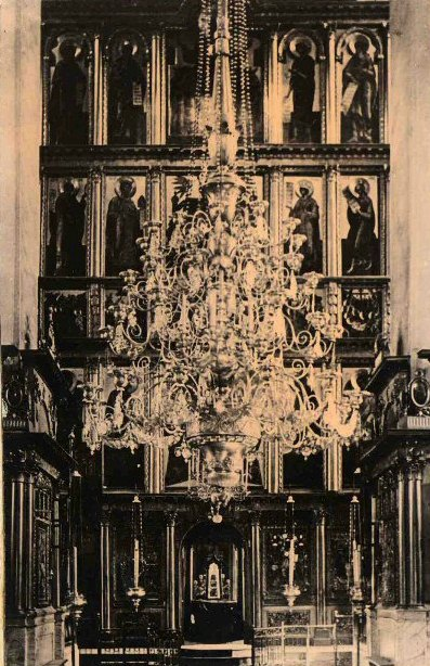 Иконостас Покровского собора села Кимры. В 1396 году собор был взорван.